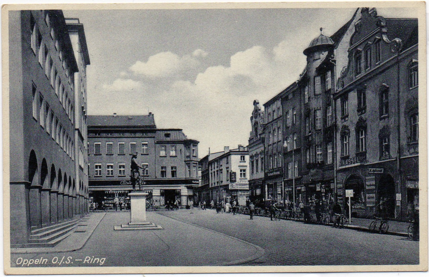 Der Ring (Rynek) in Oppeln auf einer Postkarte von 1938